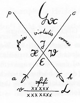 Großes Bundeszeichen der Westfälischen Gesellschaft zu Erlangen (1798–1809).